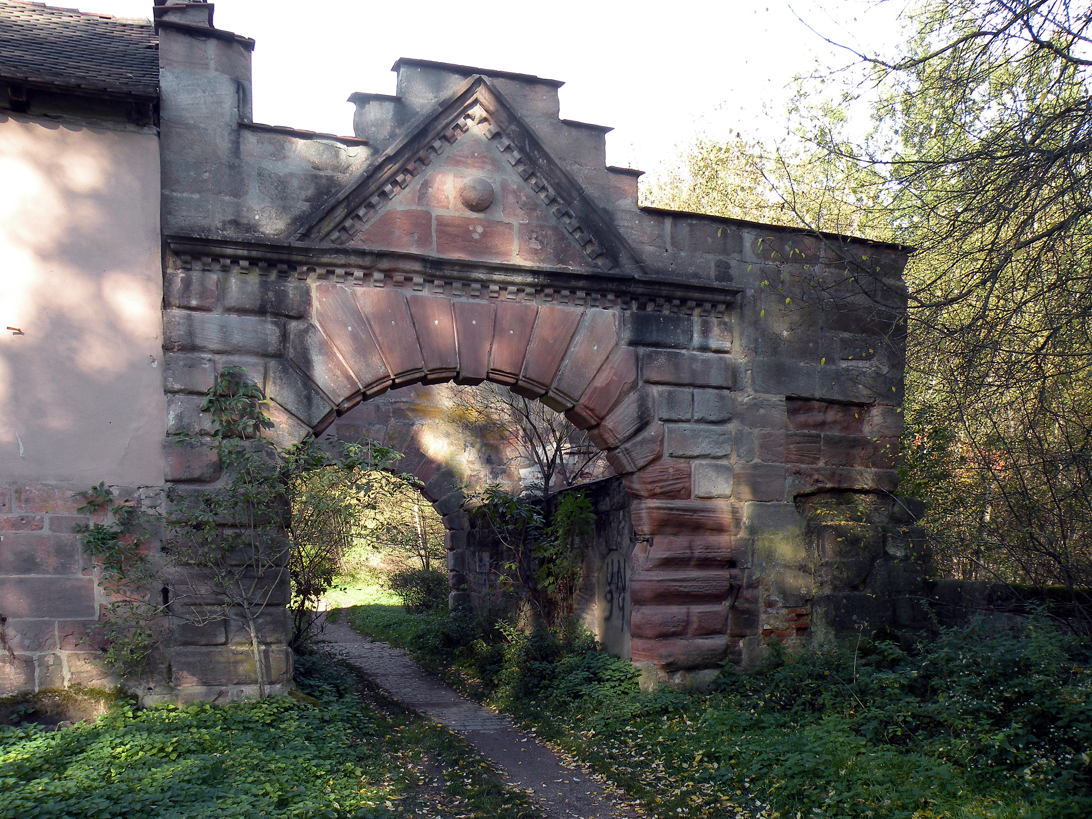 Вассершлосс Обербюрг.Ворота